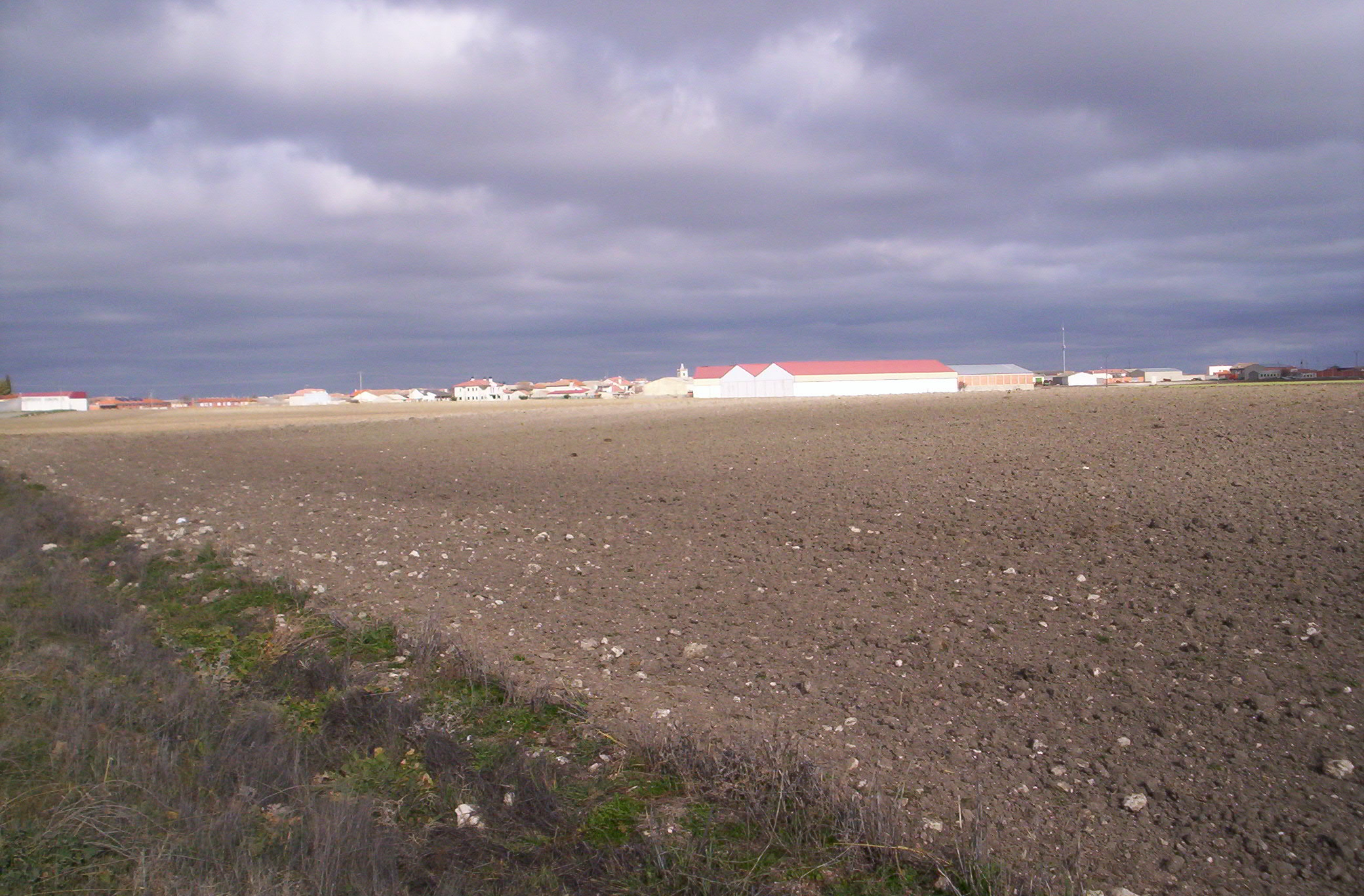 Vista de Campaspero